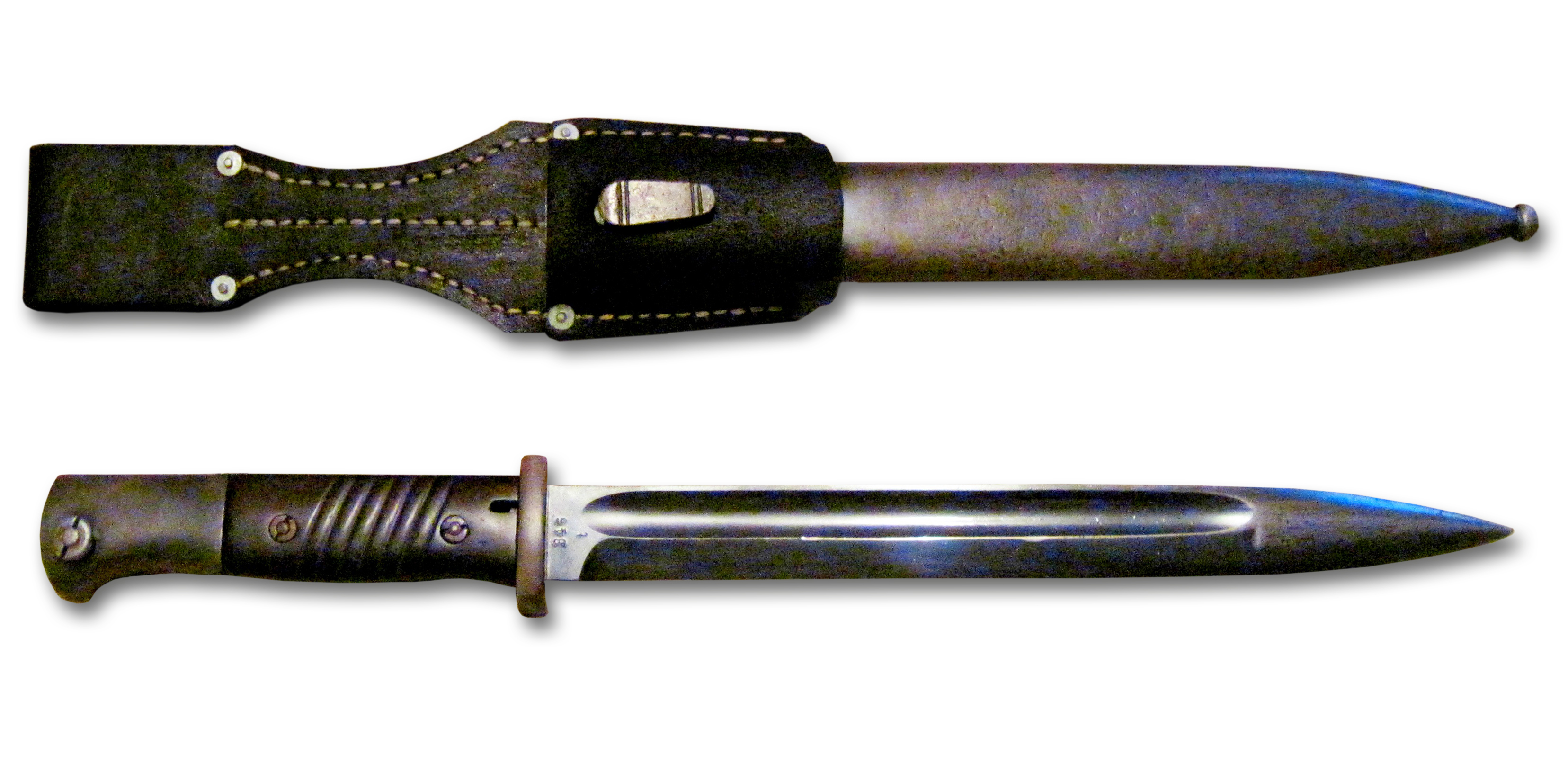 Bagnet wyjęty z pochwy